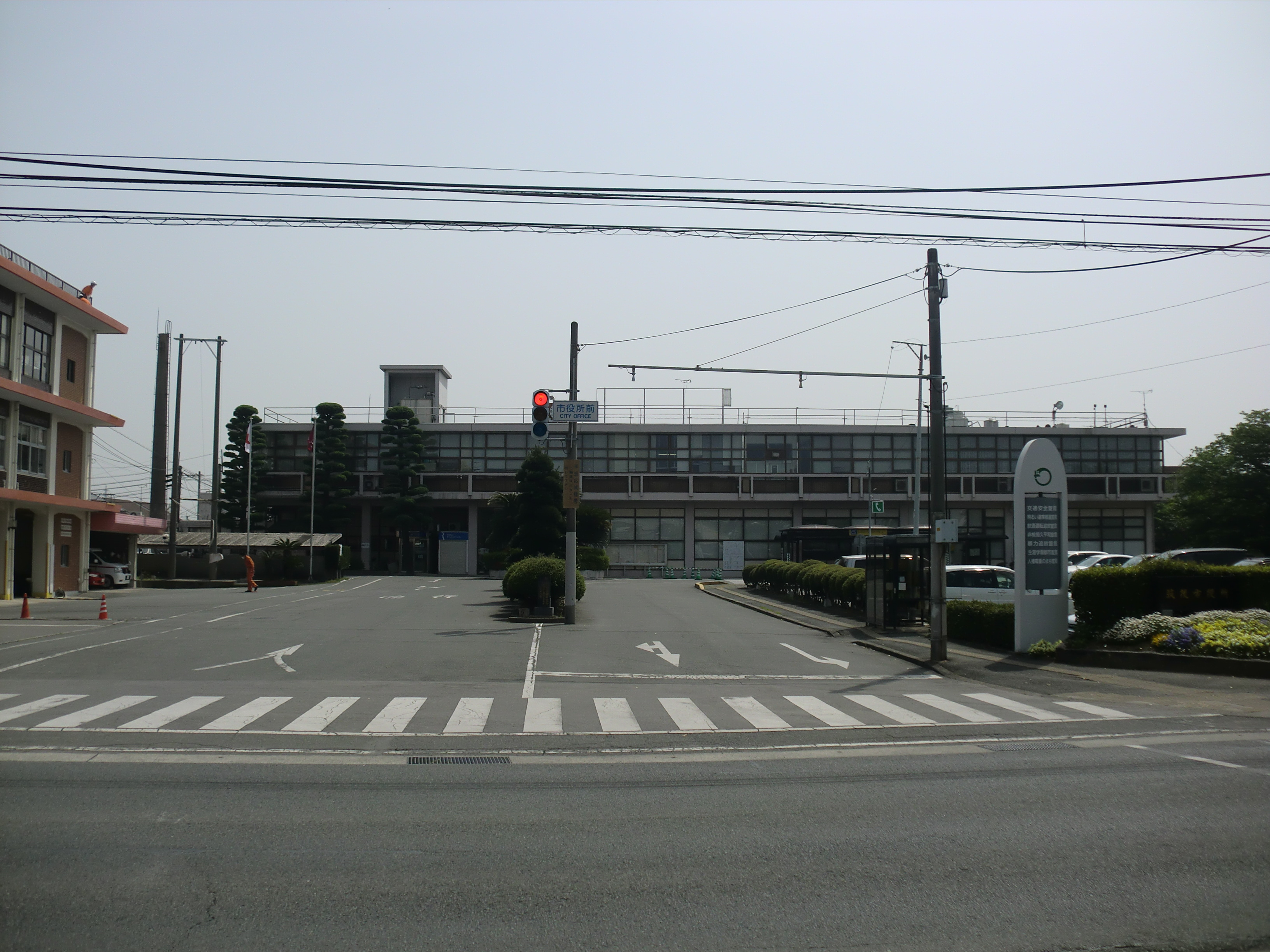 福岡県筑後市にある筑後市役所